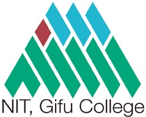 岐阜工業高等専門学校シンボルマーク